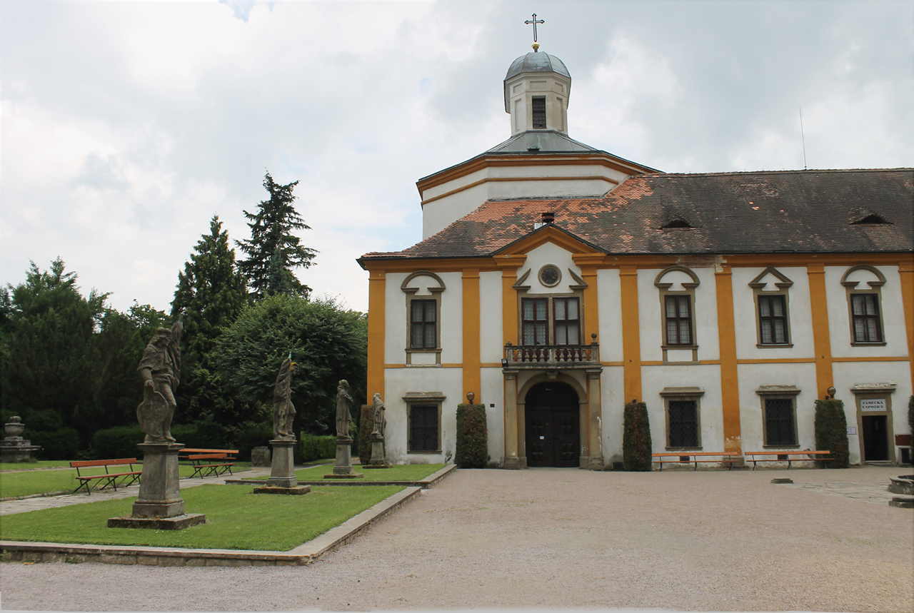 Zámek Choltice, nám. Sv. Trojice 1, Choltice, Choltice.